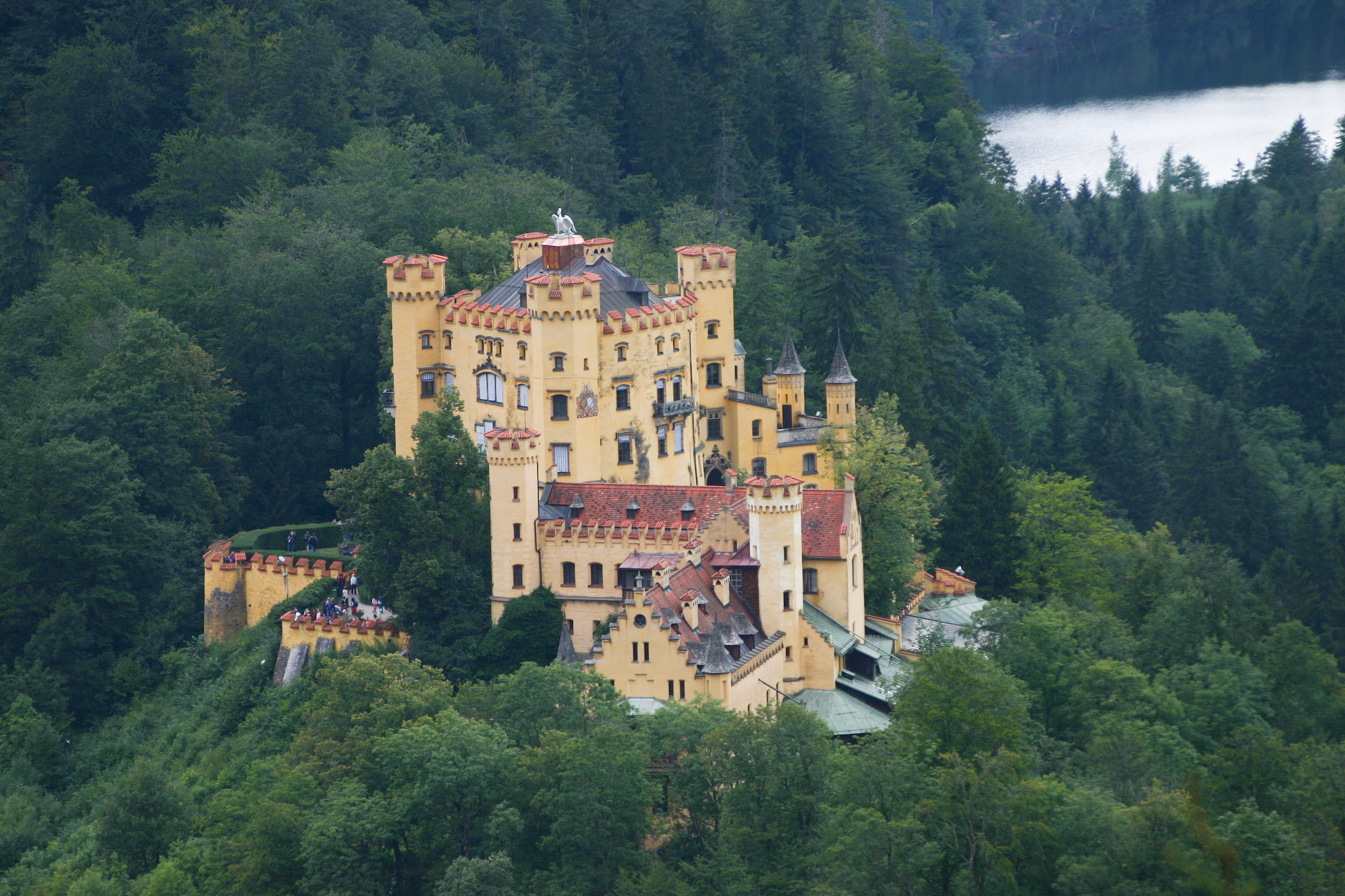 Hohenschwangau